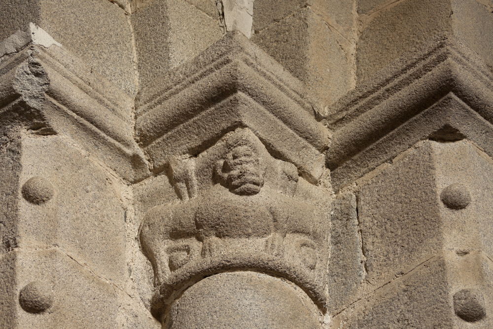 unidentified Spain